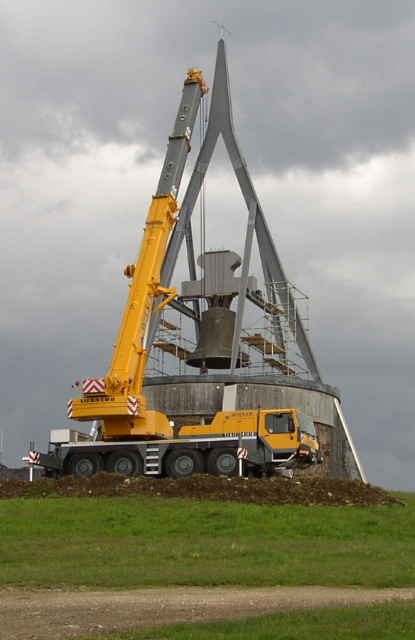 Installation der Glocke "Concordia 2000" auf dem Kronplatz